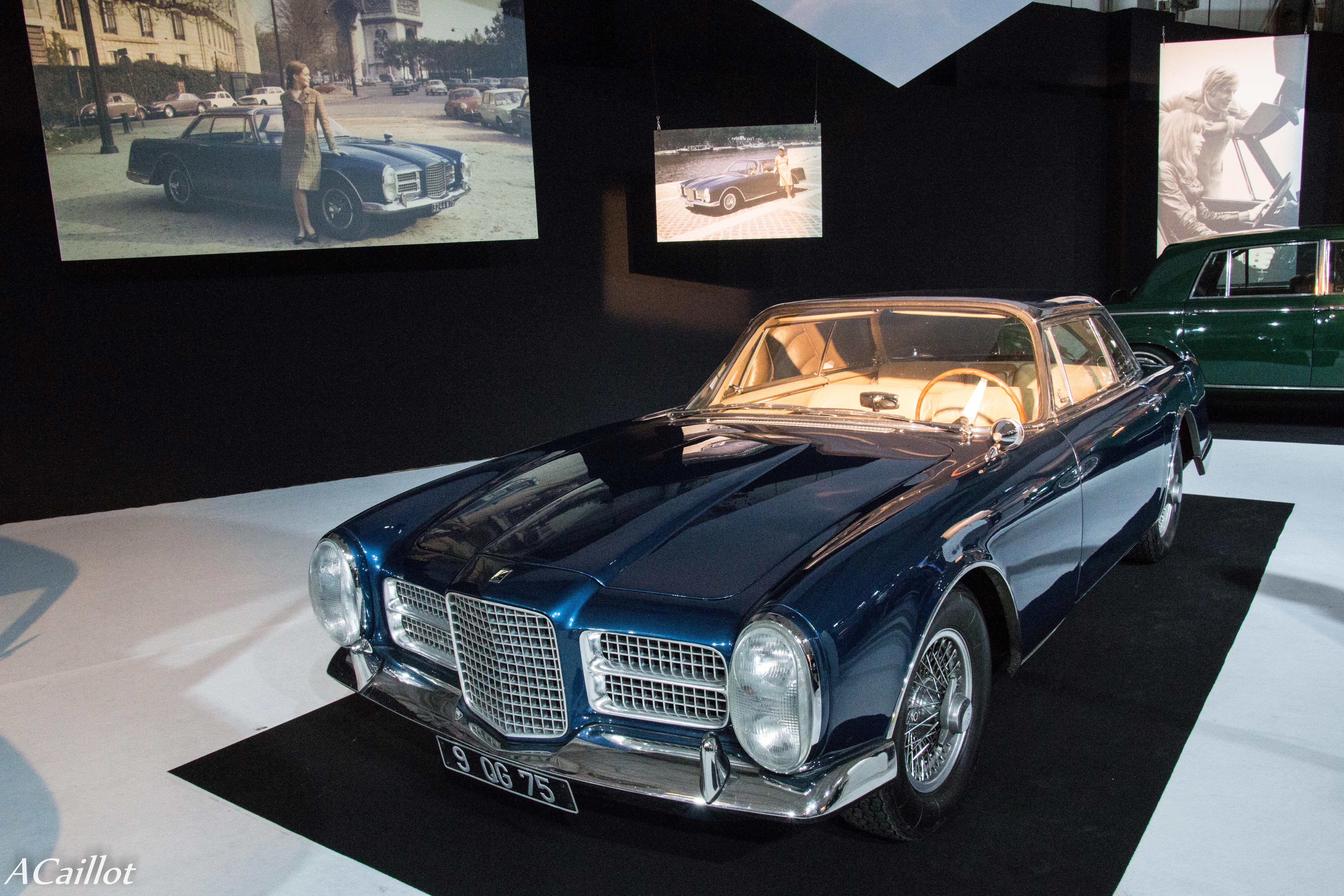 Mondial de l'auto, Paris, 2014